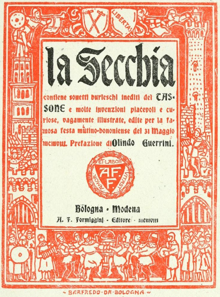 Couverture de la Secchia, signée Barfredo da Bologna [Alfredo Baruffi]